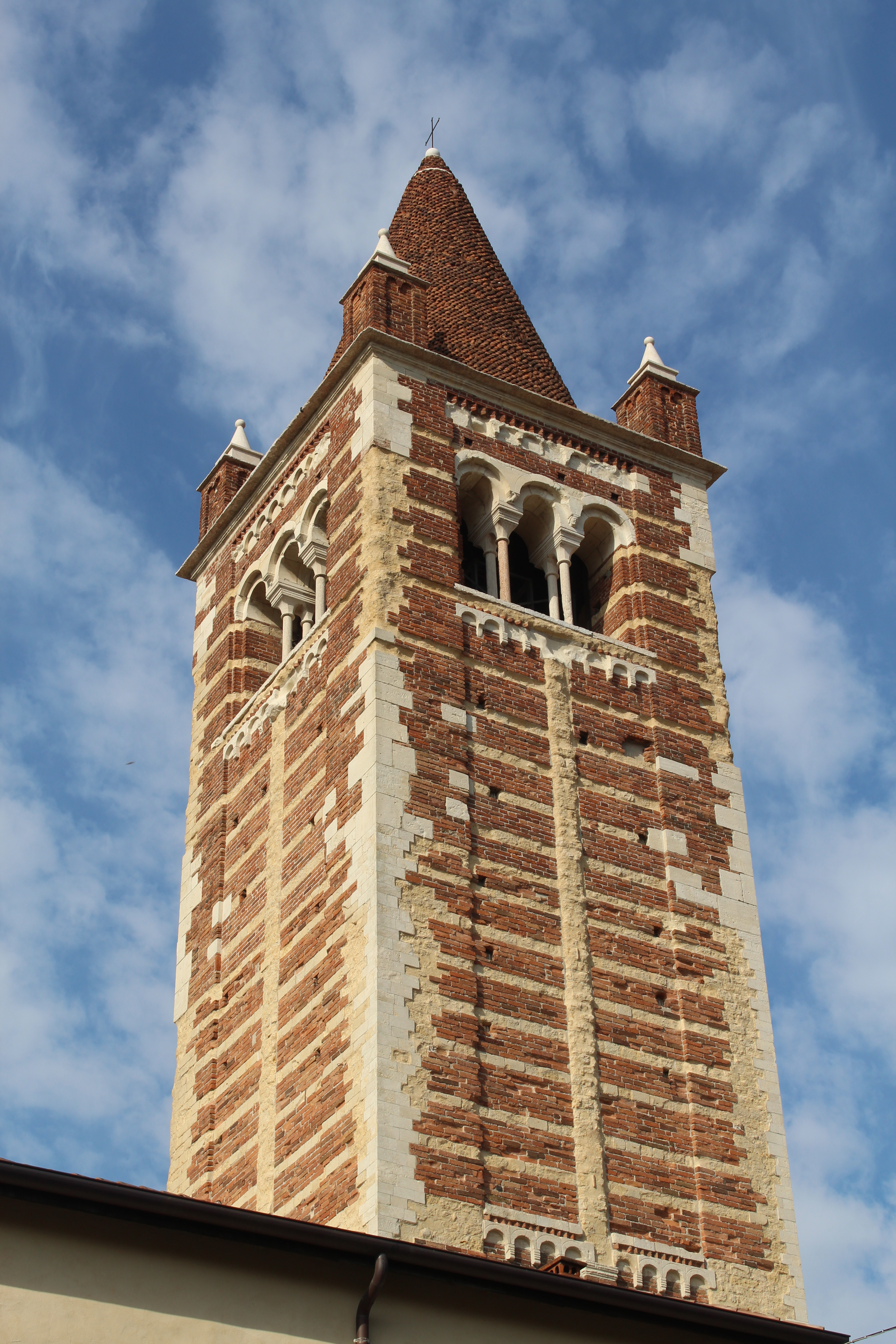 Campanile della chiesa della Santissima Trinità in Monte Oliveto a Verona